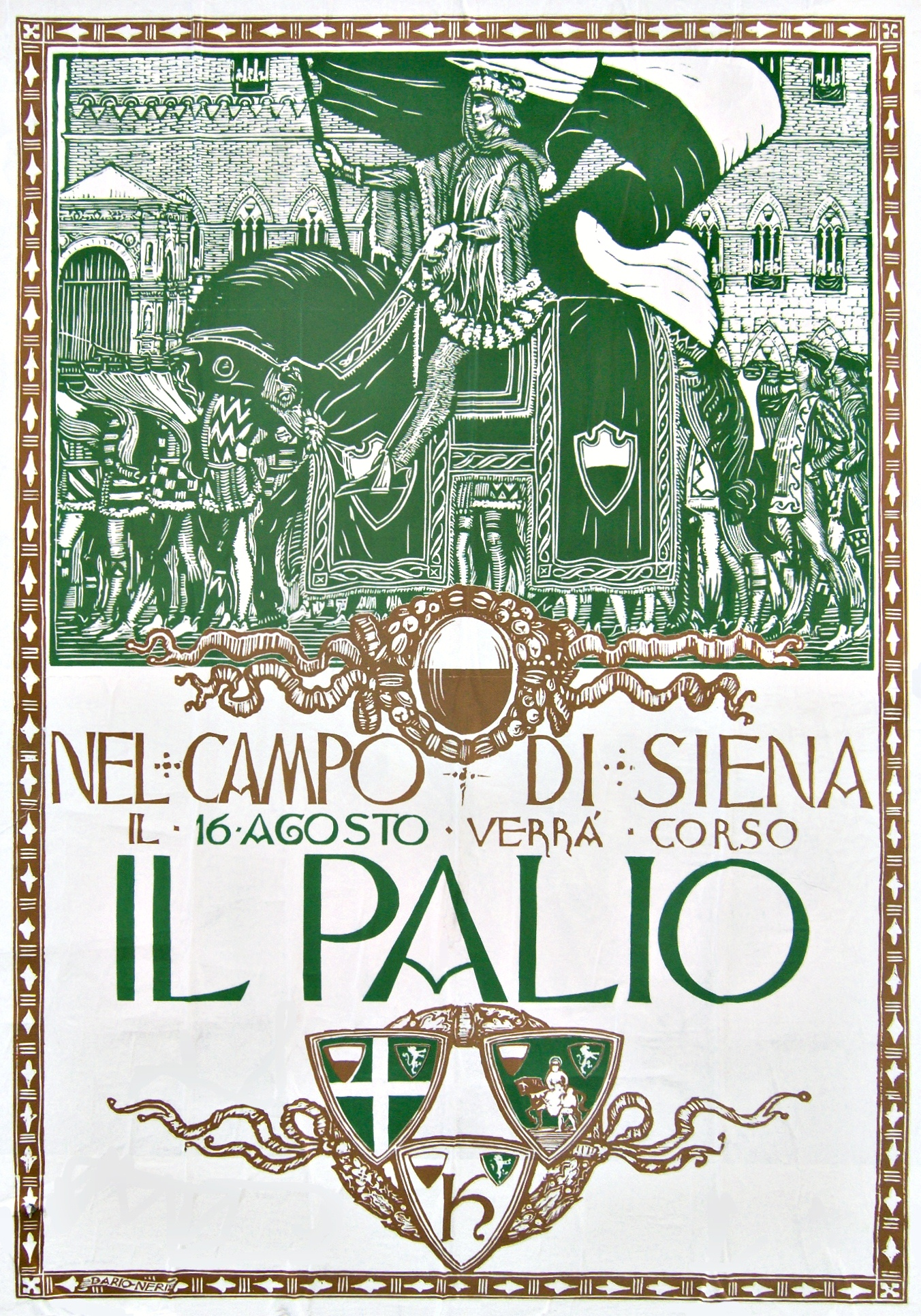 Image Palio dell'Assunta (16/08/2006) - Siena